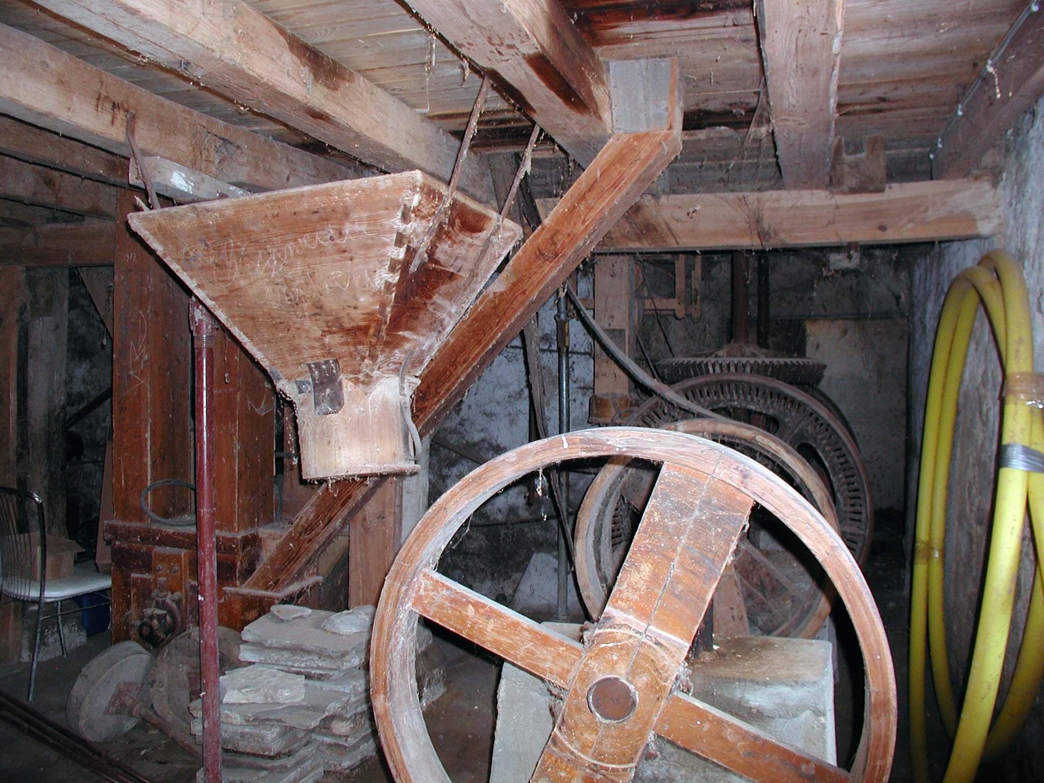 Bad Münstereifel Arloff. Alte Mühle, Reste der Anlage